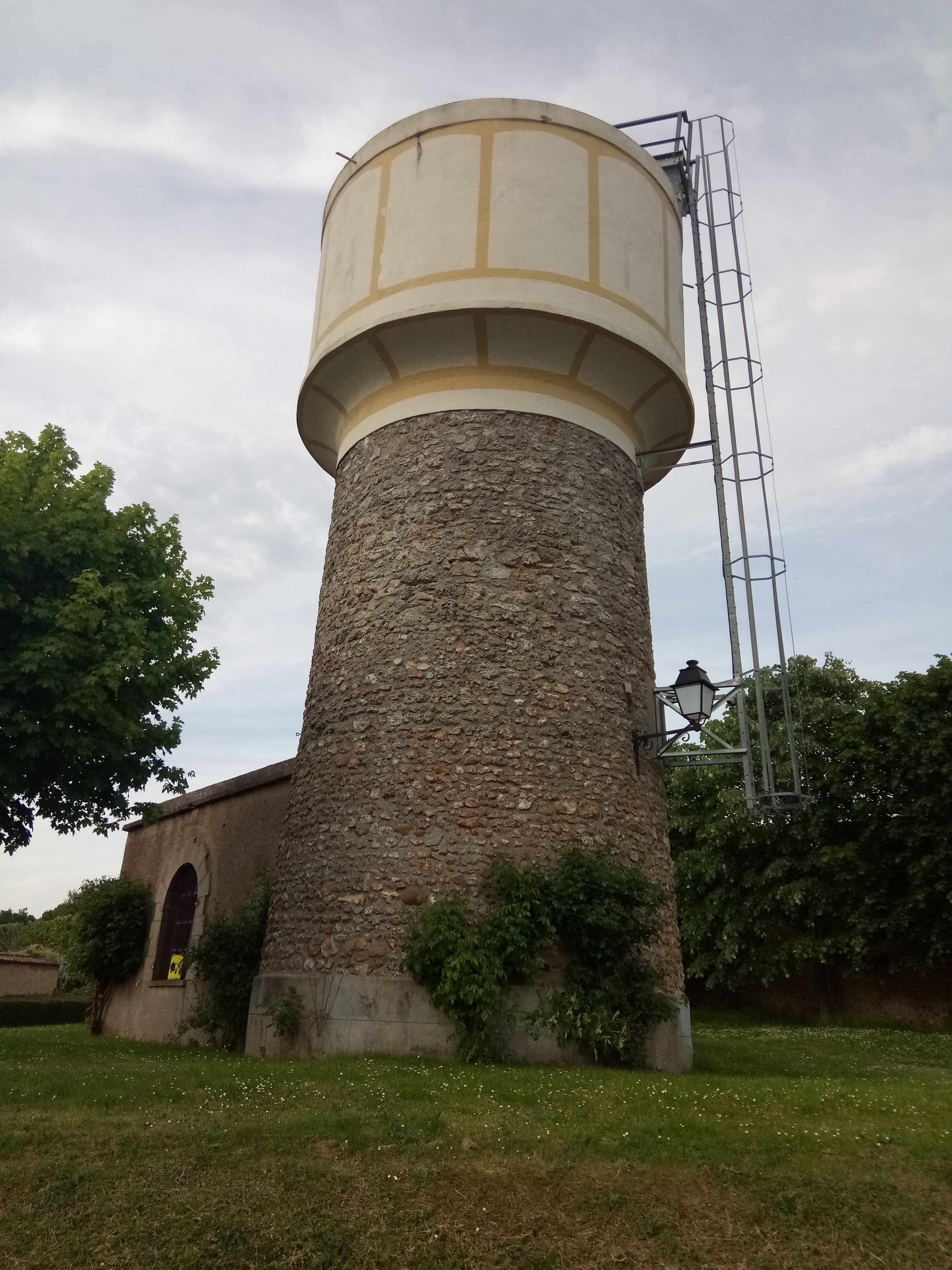 Château d'eau à Bouglainval